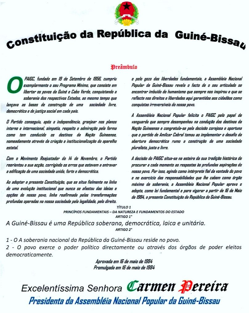 Parte preambular da Constituição da Guiné-Bissau.